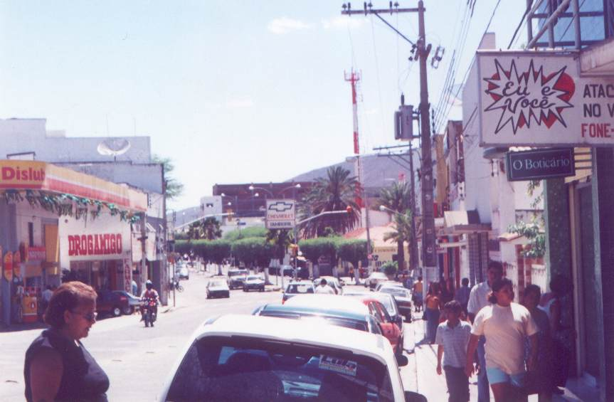 Zentrum von Arcoverde-PE, Brasilien